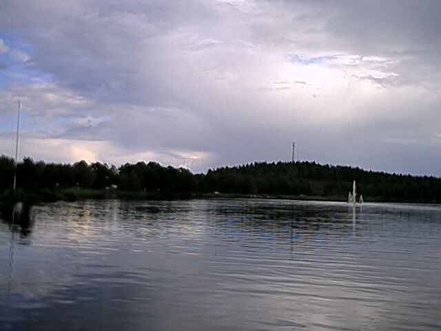 Osbysjön.